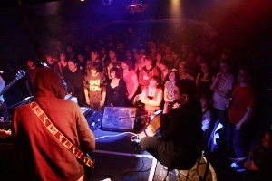 Meursault